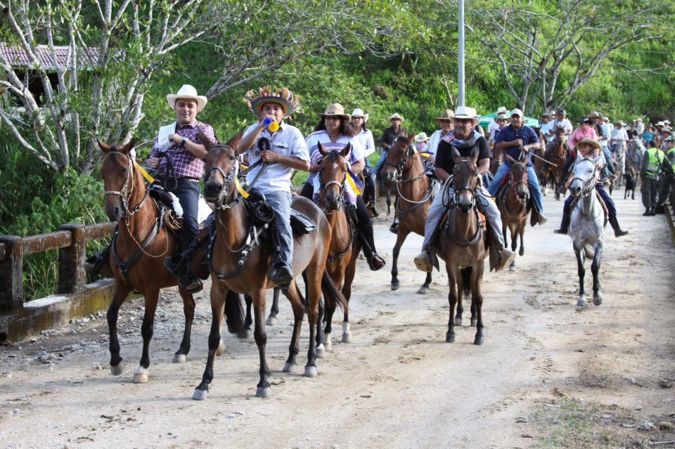 Cabalgata del Retorno Alejandria